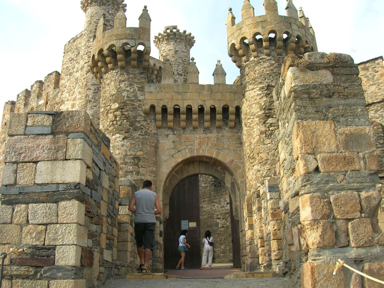 Castillo templario de Ponferrada. Vuela hasta esta localización (Necesitas Google Earth)